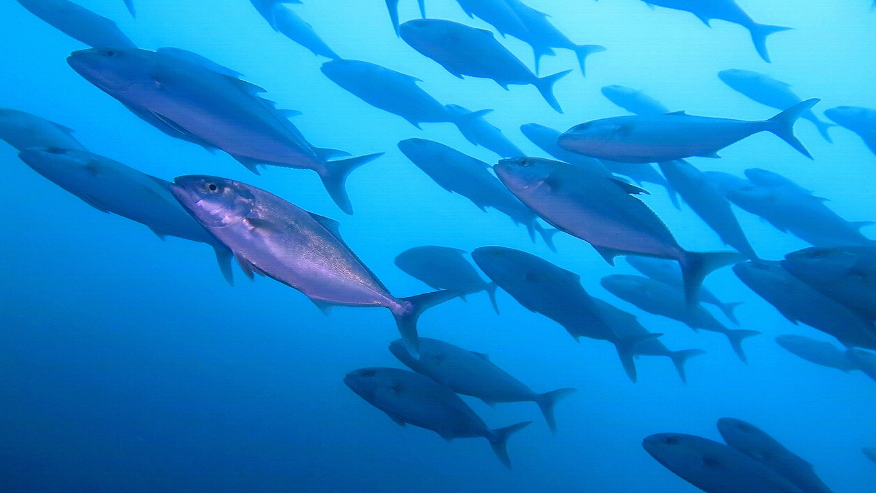 A school of Japanese amberjack (Seriola quinqueradiata) in the south shore of Long-Dong Bay, a famous scuba diving site located at northeast coast of TAIWAN. This photo was taken by Vincent C. Chen on May 23, 2015